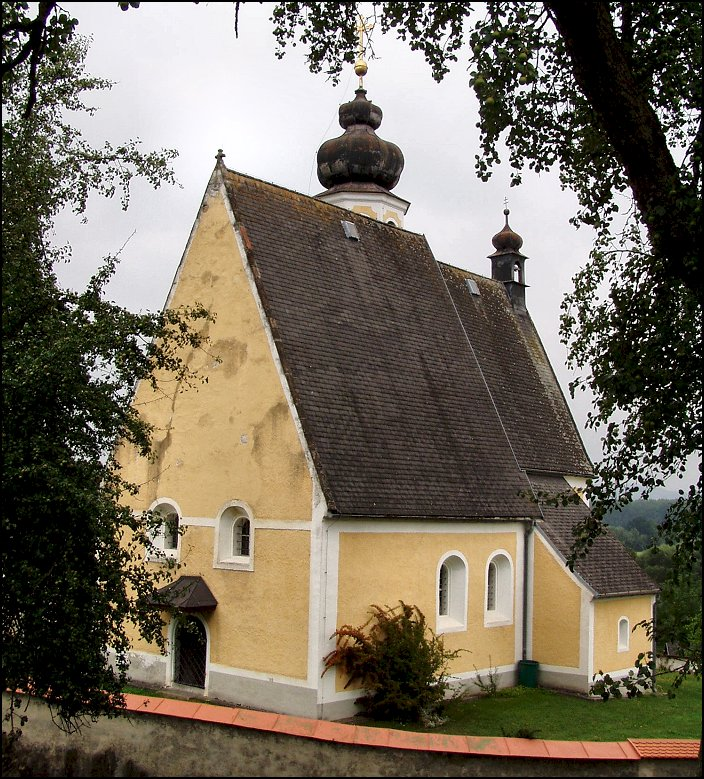 Wallfahrtskirche Hilkering in der Gemeinde Hartkirchen